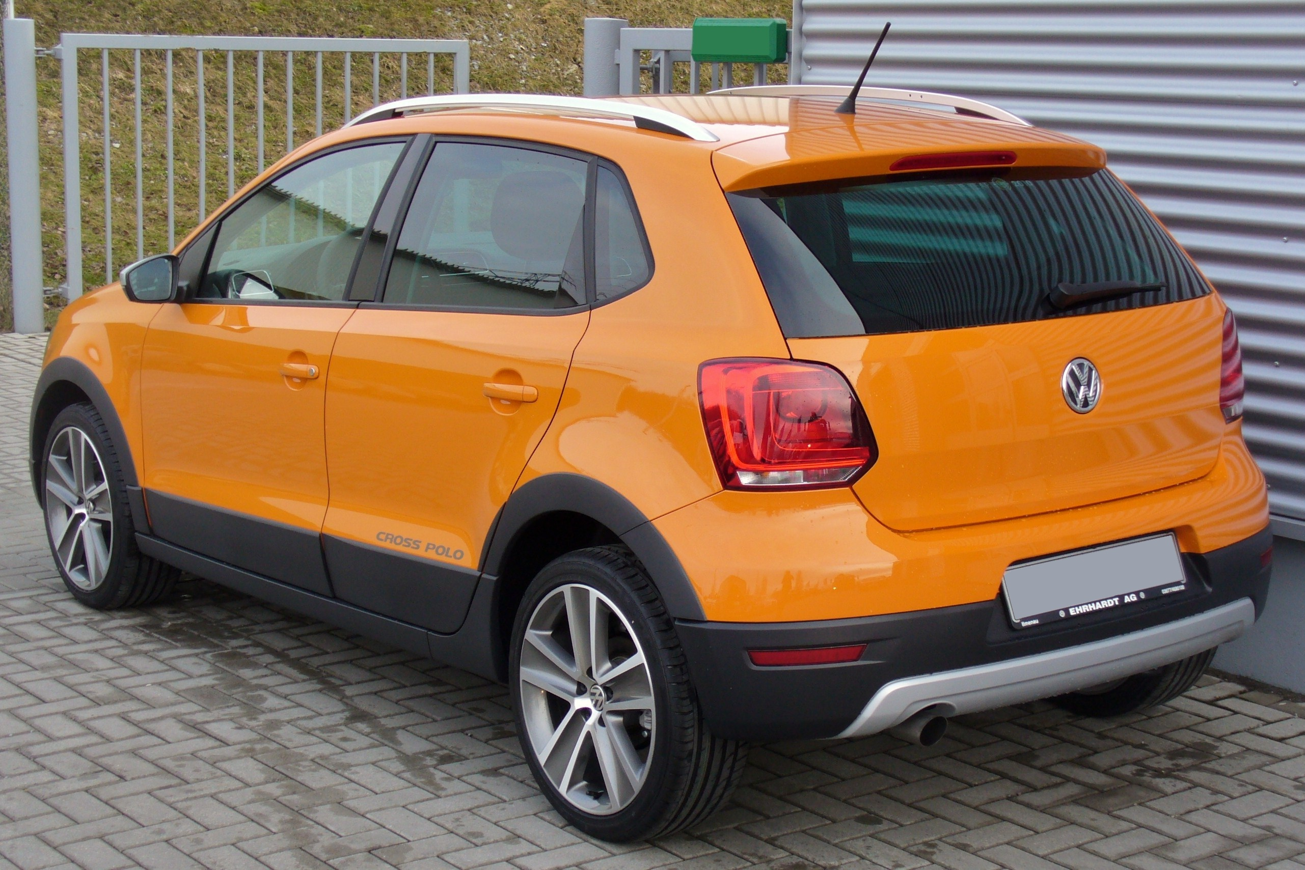 VW CrossPolo